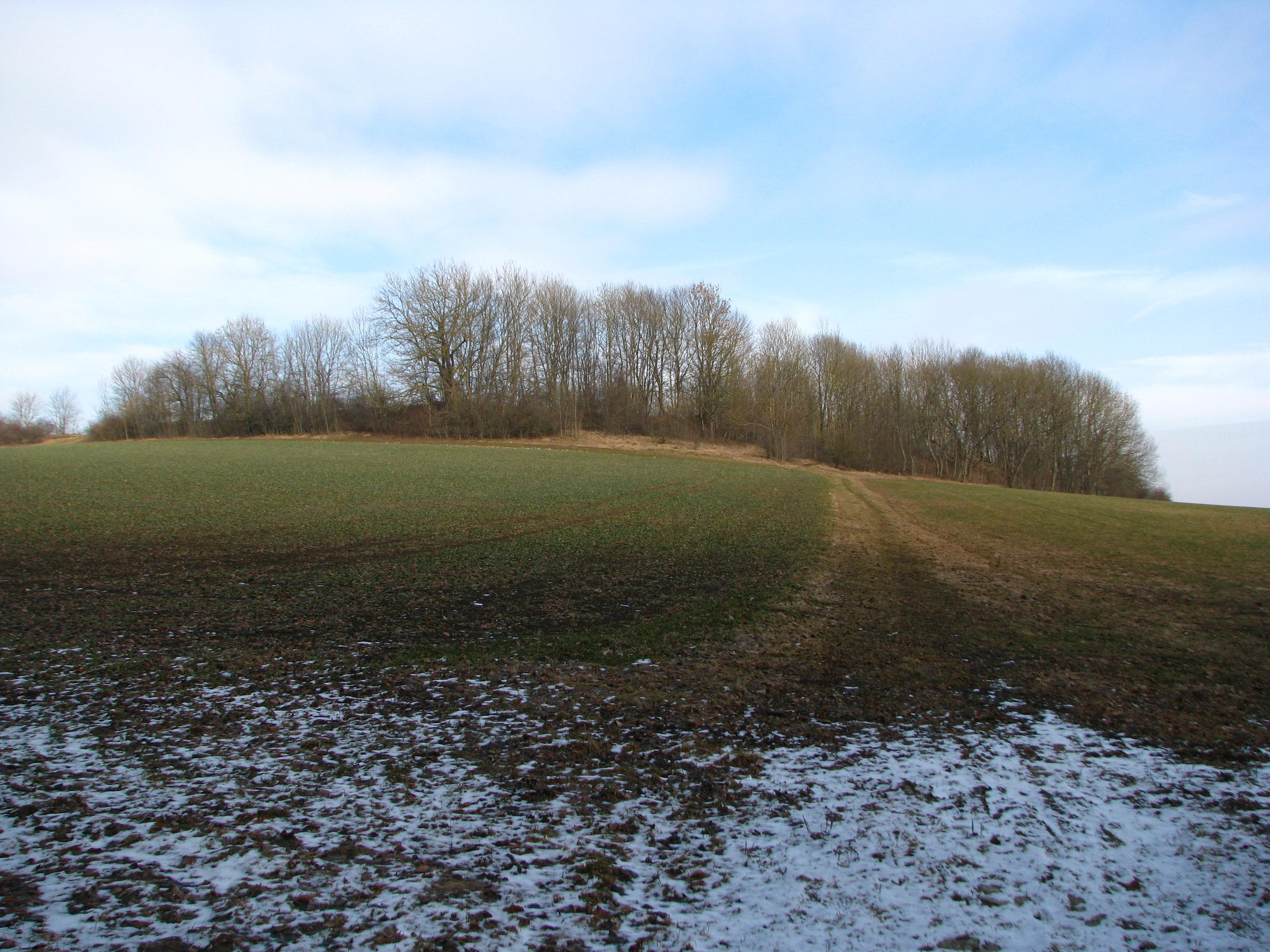 Der Eigenrieder Burgberg (489,1 m) vom Mühlhäuser Landgraben aus gesehen.